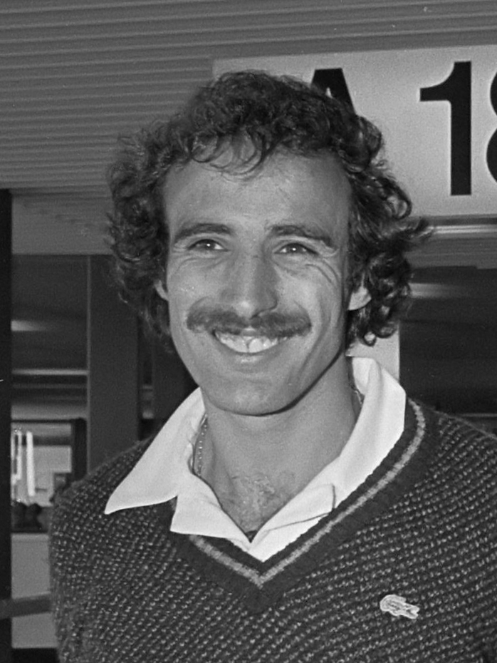 AZ67 naar Sofia voor Europacup III wedstrijd tegen Levski Spartak Sofia , v.l.n.r. Kurt Welzl , trainer Kessler, Kees Kist op Schiphol 20 oktober 1980